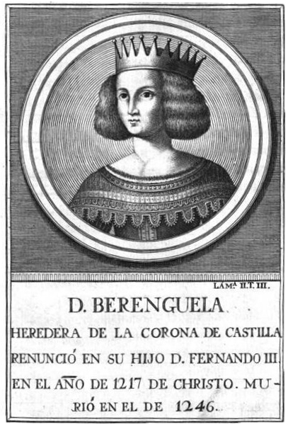 Retrato de Doña Berenguela, heredera de la corona de Castilla, ilustración del libro (escaneado por Google) Retratos de los reyes de España, desde Atanarico hasta ... D. Carlos III.